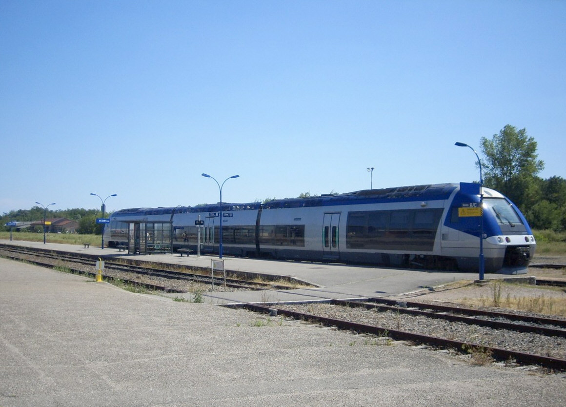 thumb|Original Bearbeitete Version von Image:Bahnhof_Wissembourg.jpg durch Smial: Aufgerichtet, zugeschnitten, Schatten aufgehellt Original-Beschreibung: (Uploaded by Benutzer:Benistengl) Summary Szenerie am Bahnhof Wissembourg im Sommer 2006. Es wartet der TER Richtung Haguenau und Strasbourg. Uploaded with Reworkhelper